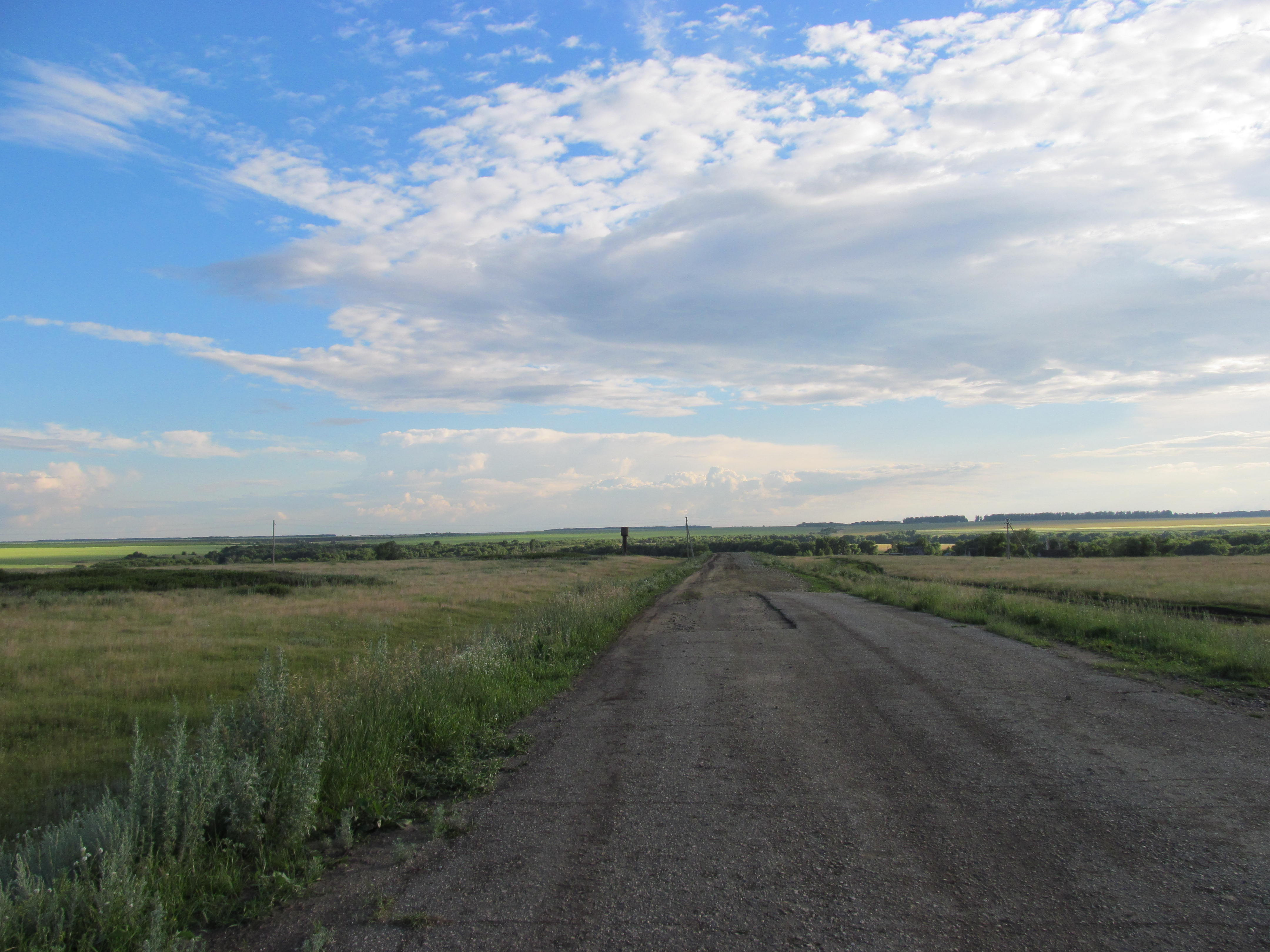 Въезд по грунтовой дороге в деревню Исаевка Тамалинского района Пензенской области